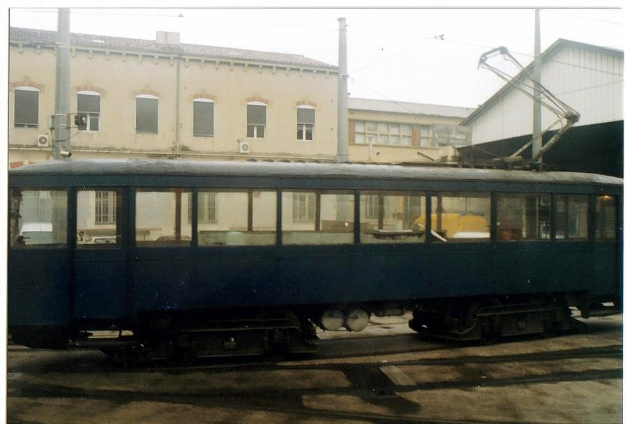 Une ancienne motrice au dépôt Saint-Pierre